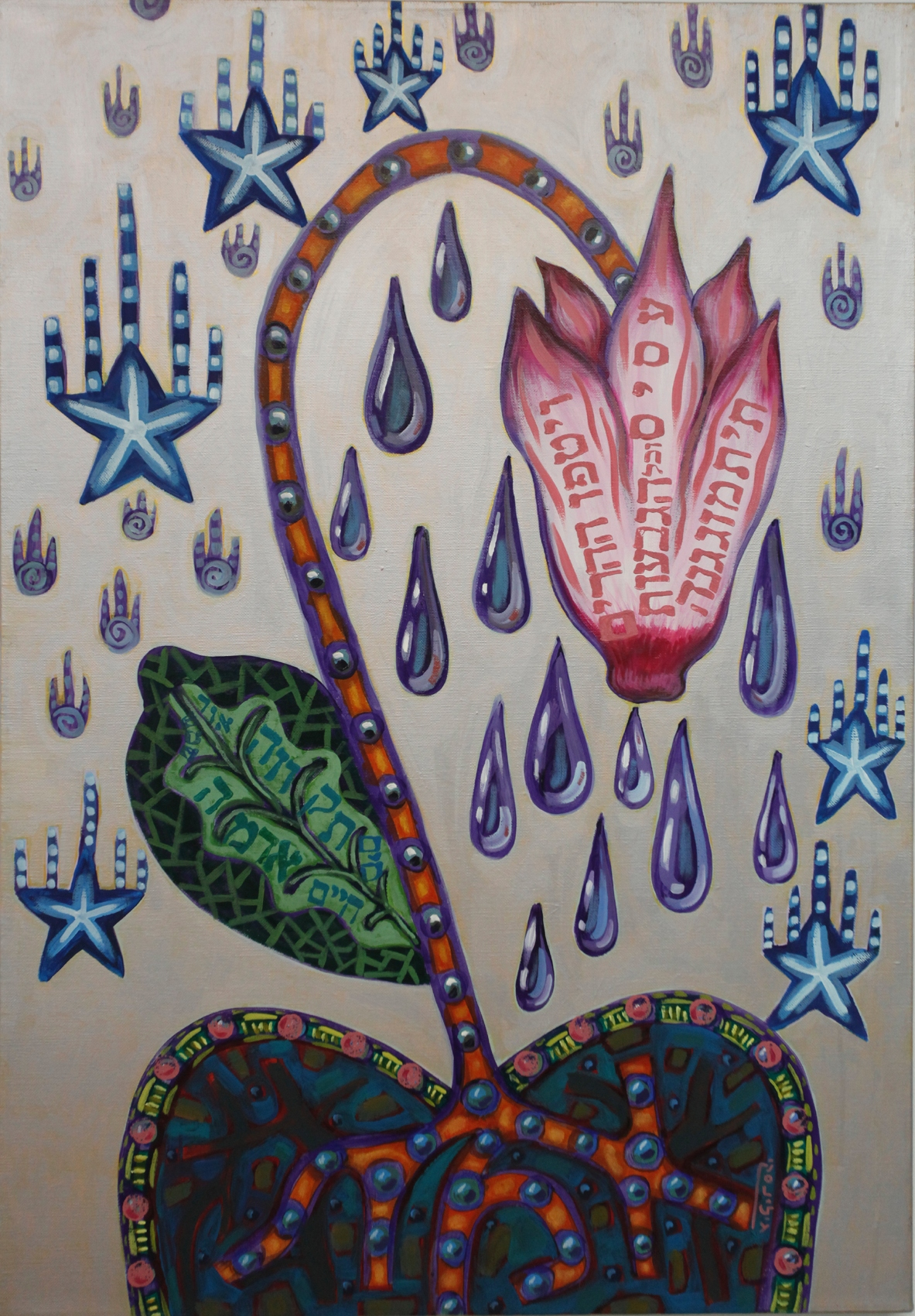 יואל גילינסקי הוא הוא צייר אמן ומרצה בכיר בבצלאל. ציור אמת 2011 אקריליק על בד